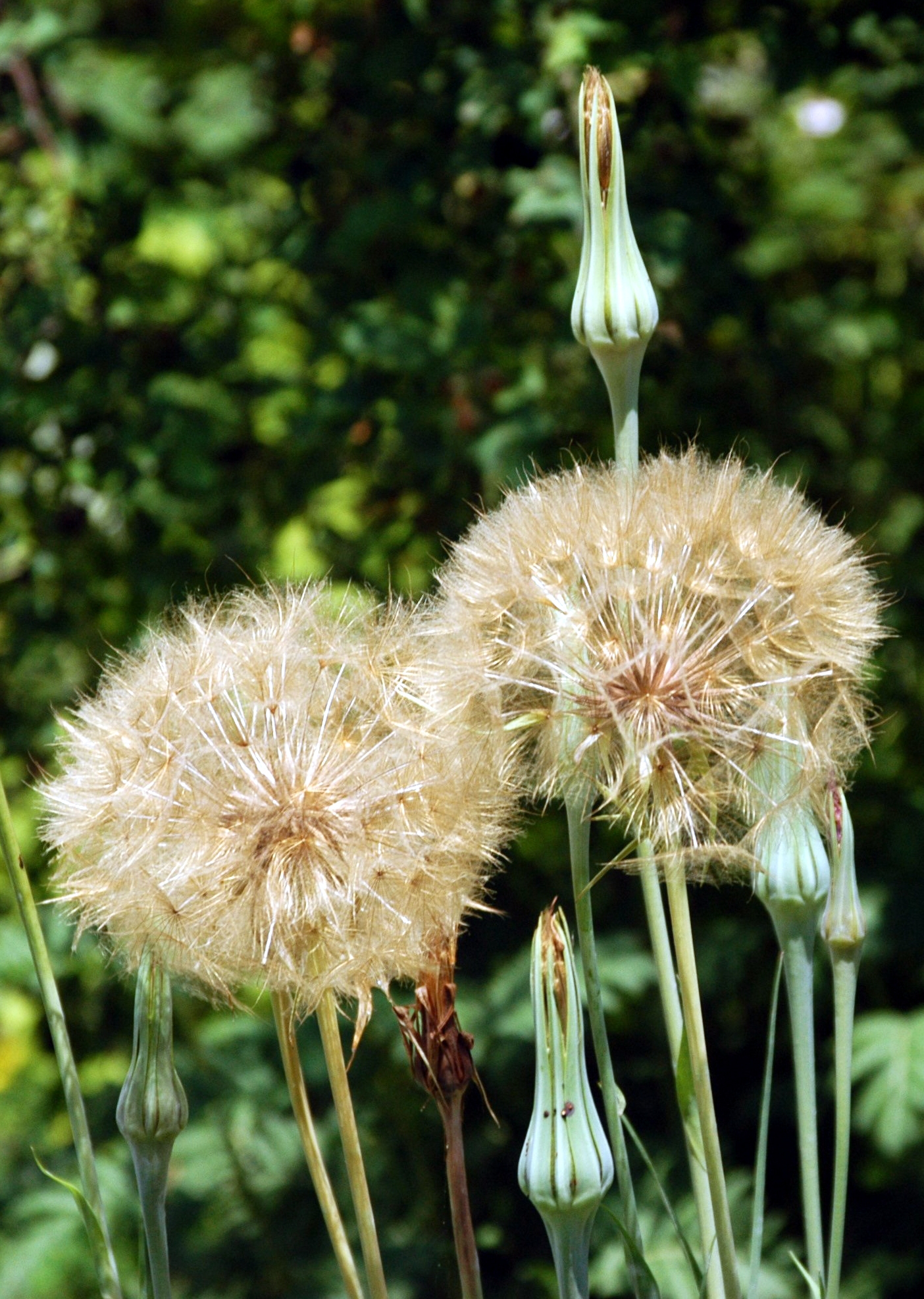 Samenkopf von Haferwurzel (Tragopogon porrifolius)